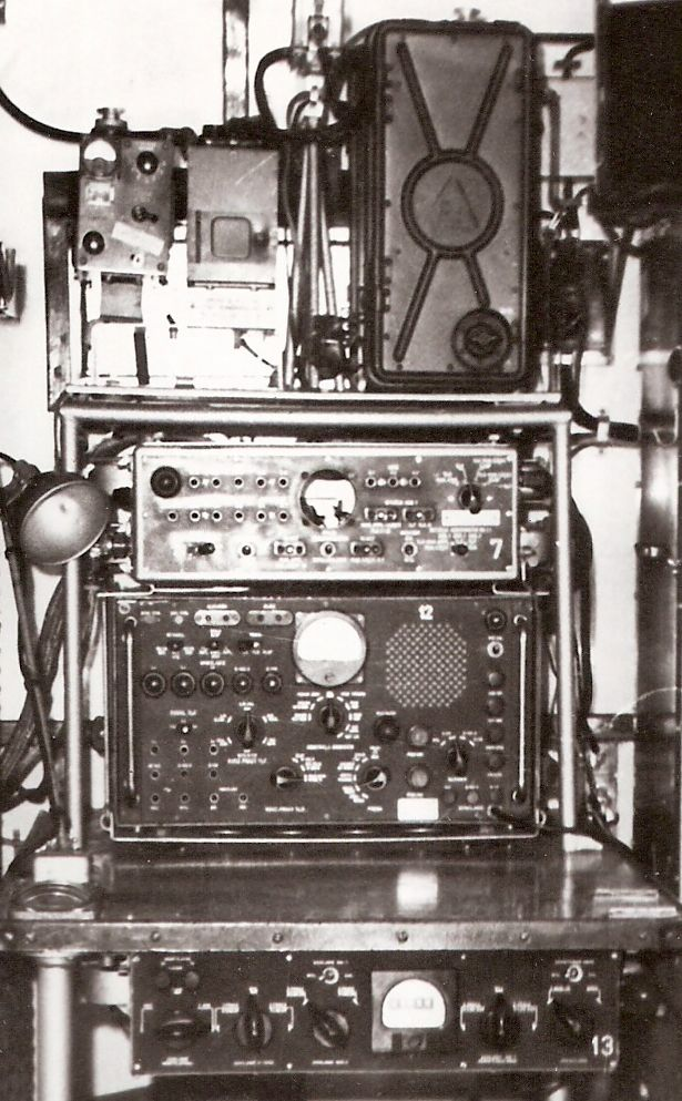 Stolik operatora radiostacji R-118. Na górze radiostacja R-105DM, obok jej wzmacniacz mocy UM. Niżej pulpit radiostacji i przystawka zdalnego sterowania PZS. Pod stolikiem pulpit ładowania i przełączania baterii akumulatorów. Zdjęcie pochodzi ze strony